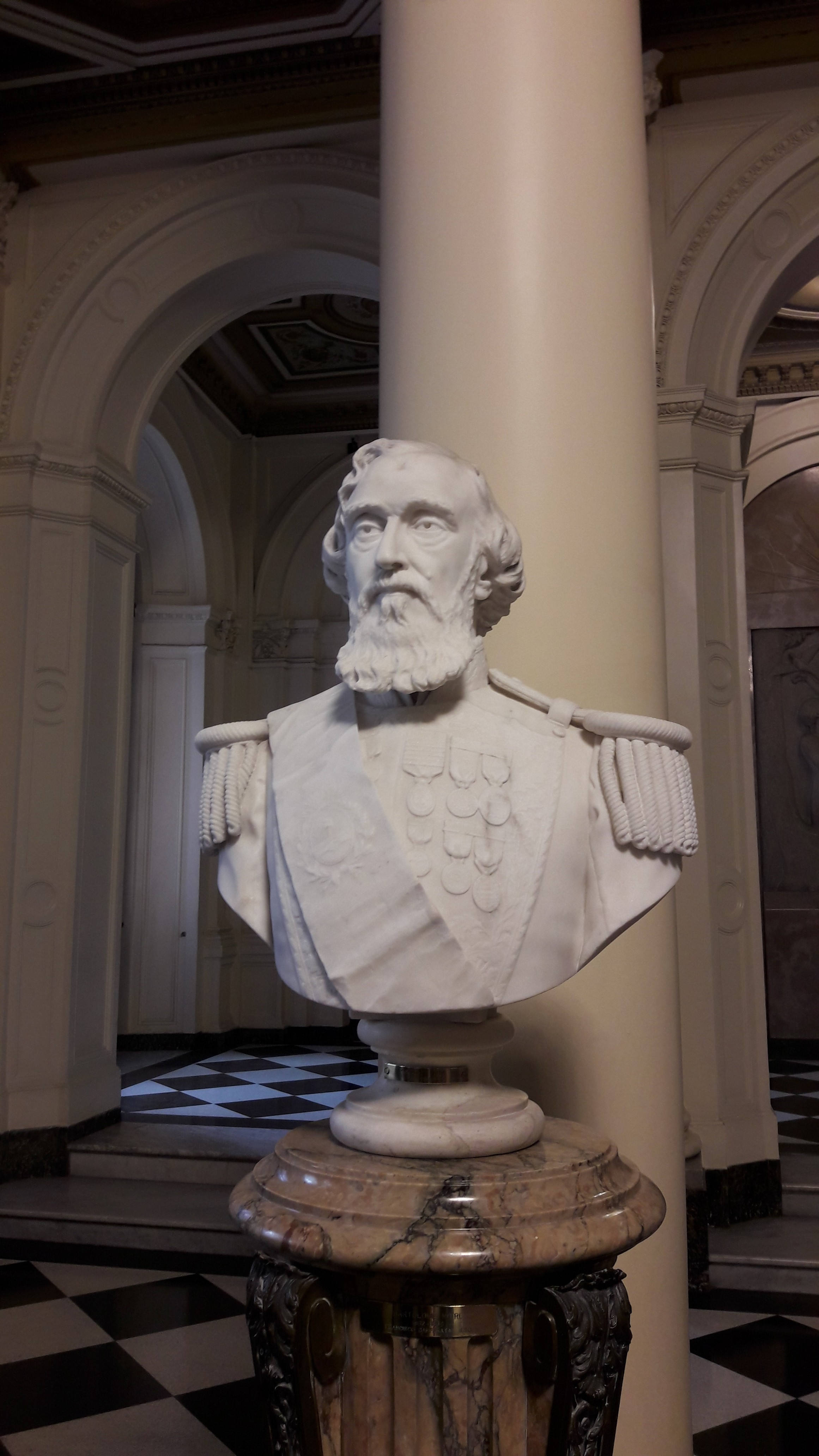 Salón de los Bustos, Casa Rosada.